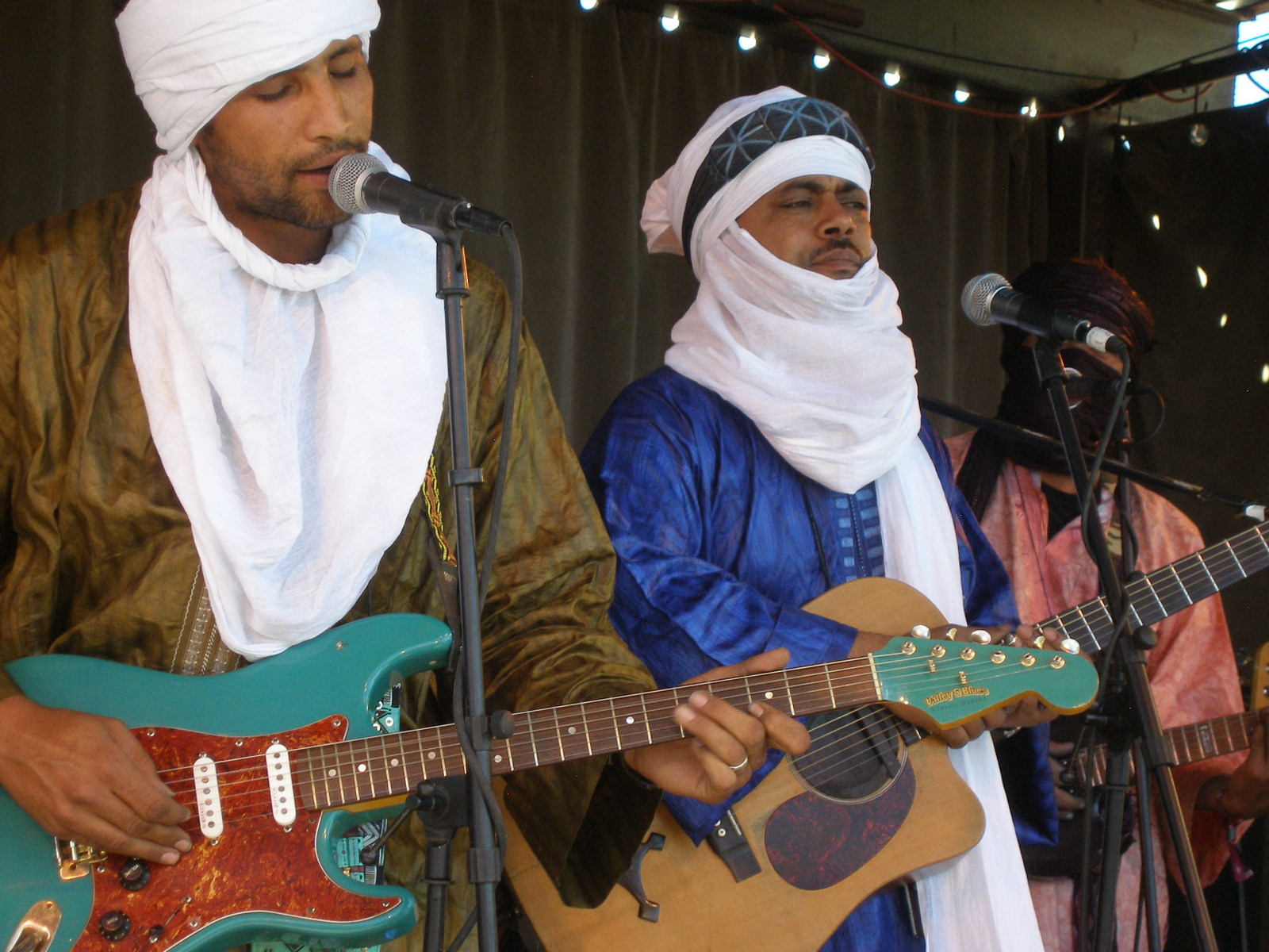 TINARIWEN at Santa Fe Brewing Co. 4-19-09